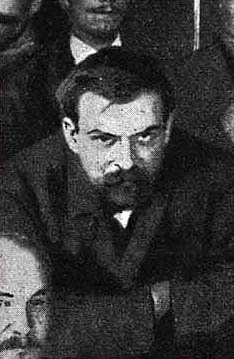 Дмитрий Федорович Сверчков (1882—1938)